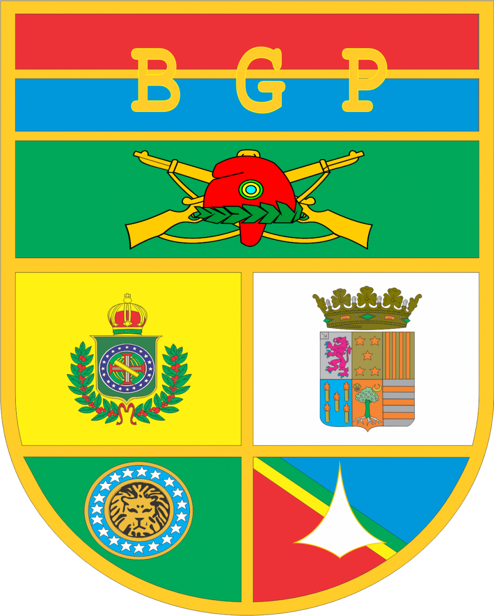 Batalhão de Guarda Presidencial Heráldica